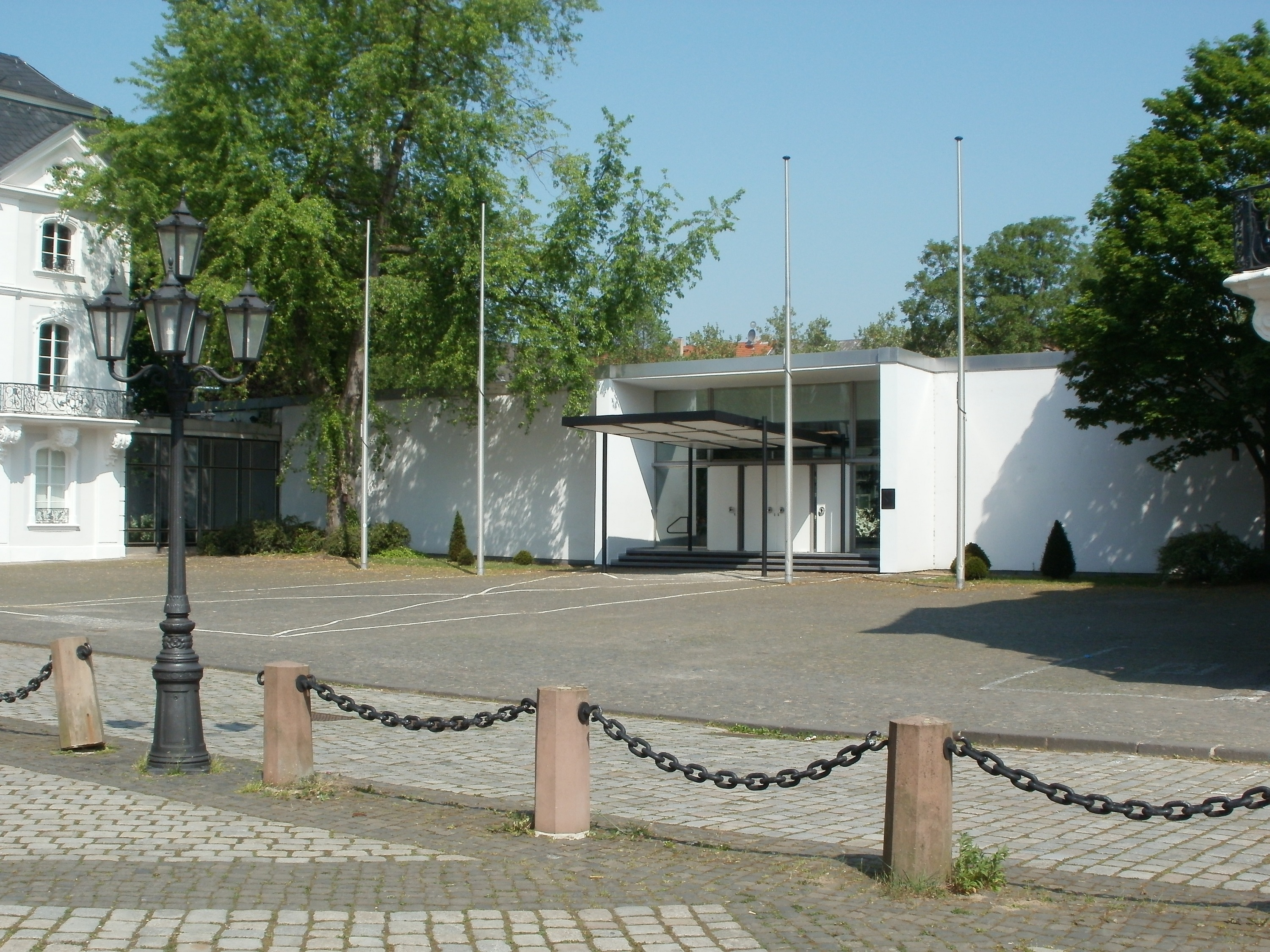 Staatskanzlei Saarland (Am Ludwigsplatz 14a)